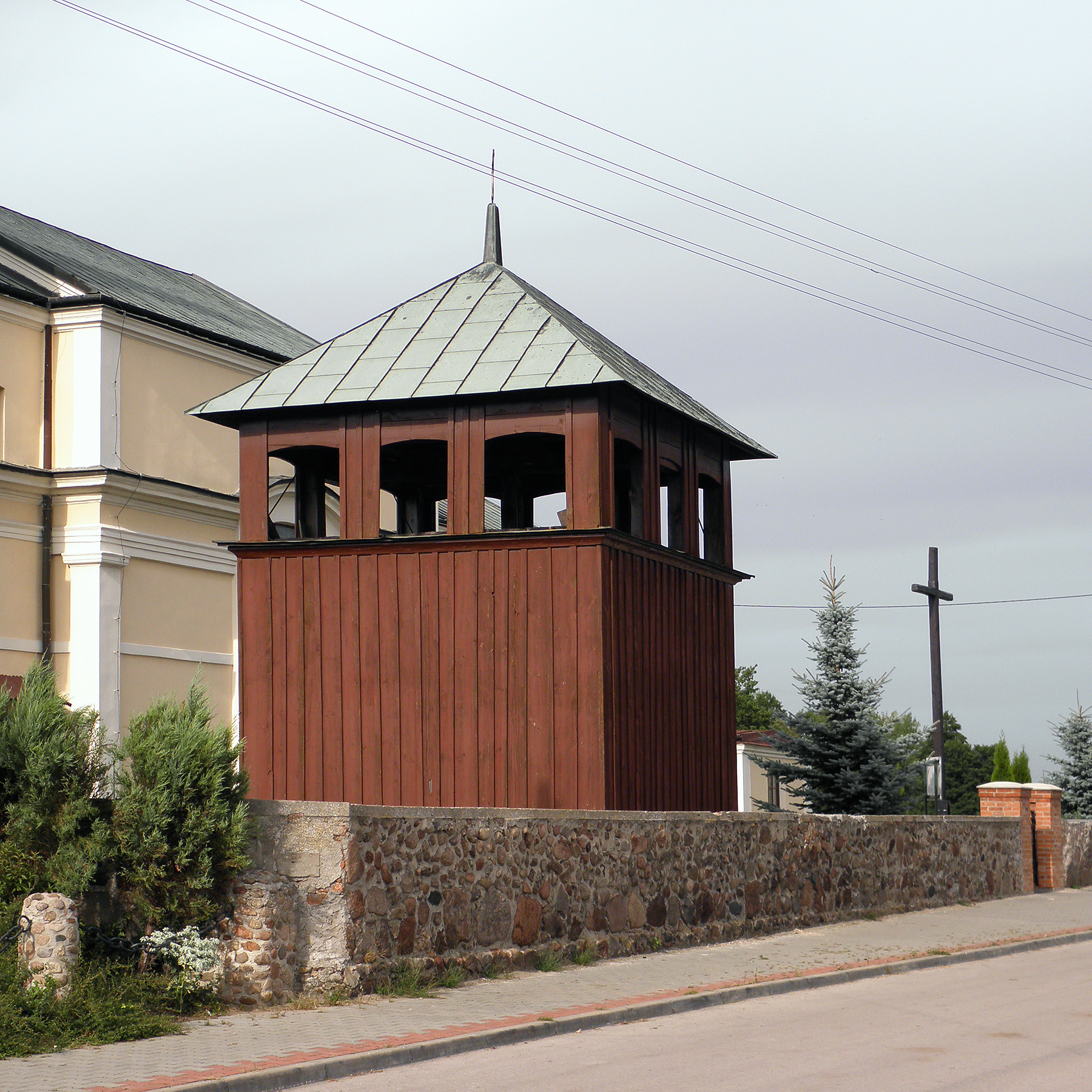 Wyśmierzyce - dzwonnica kościoła p.w. Zwiastowania NMP.